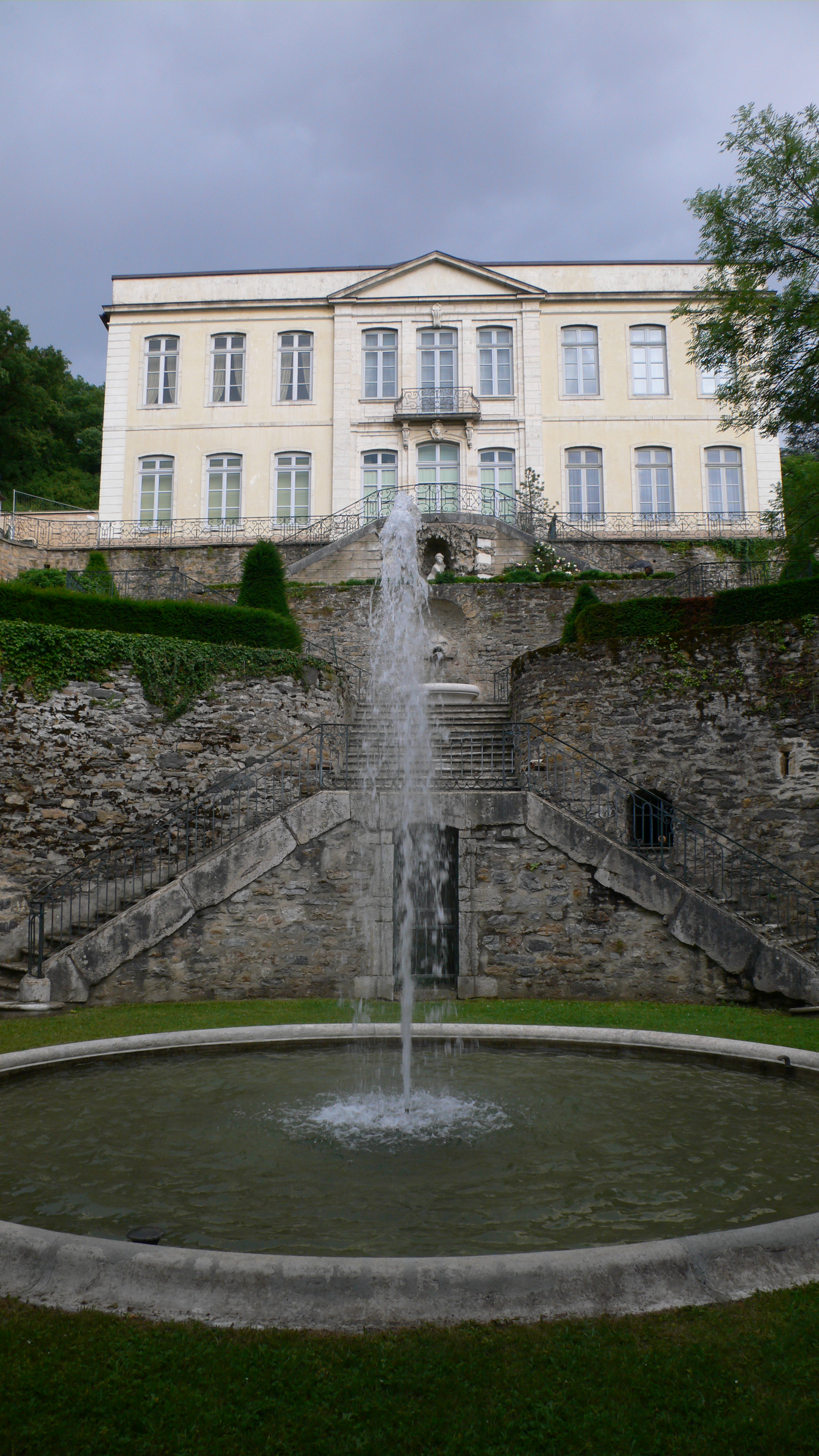 Caluire-et-Cuire - Maison de la Rivette façade ouest